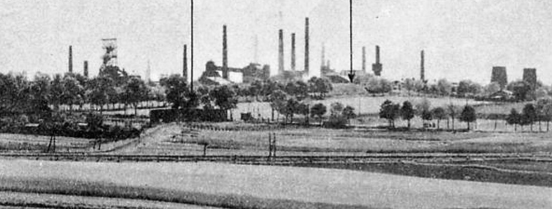 Wieża wyciągowa szybu Schwerin (Drzymały) kopalni węgla kamiennego Łagiewniki (Florentine), huta Zygmunt (Hubertus) i koksownia w Łagiewnikach (obecnie Bytom).